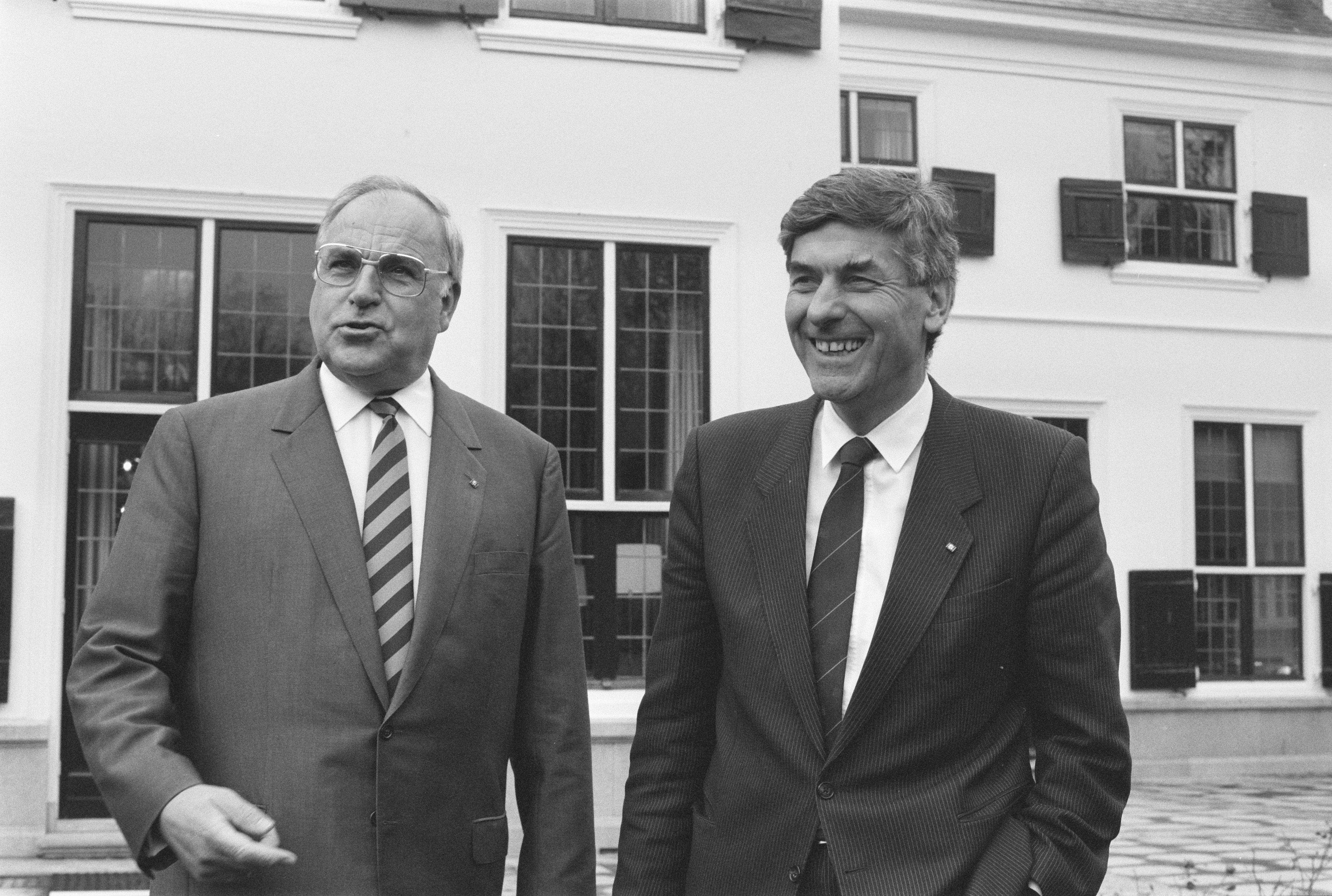 Collectie / Archief : Fotocollectie Anefo Reportage / Serie : [ onbekend ] Beschrijving : Bezoek bondskanselier Helmut Kohl ; Helmut Kohl en premier Lubbers in de tuin van het Catshuis Datum : 30 november 1987 Trefwoorden : bezoeken Persoonsnaam : Helmut Kohl, Lubbers, Ruud Fotograaf : Croes, Rob C. / Anefo Auteursrechthebbende : Nationaal Archief Materiaalsoort : Negatief (zwart/wit) Nummer archiefinventaris : bekijk toegang 2.24.01.05 Bestanddeelnummer : 934-1402